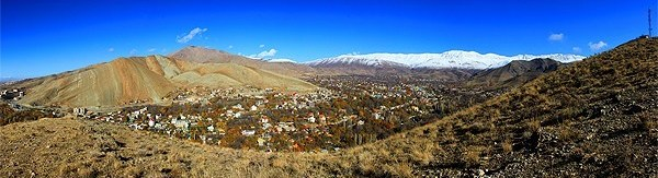 شهر دماوند